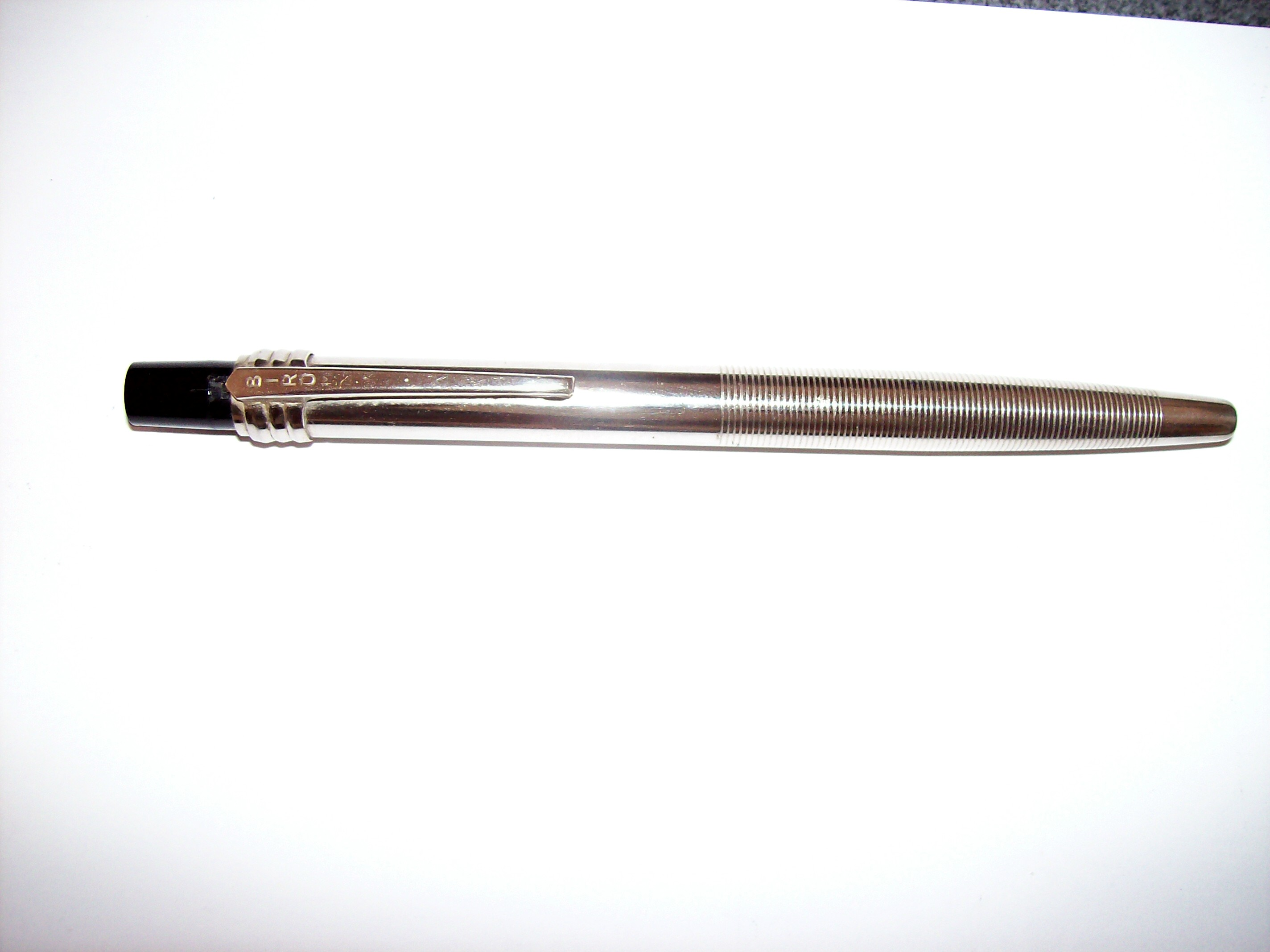 Primer bolígrafo marca "birome", made in Argentina